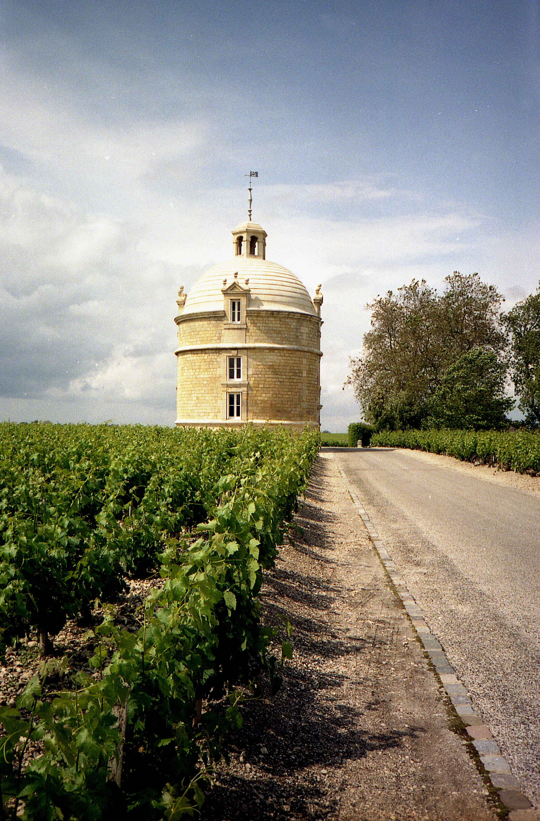 Château La Tour - Bordeaux - Pauillac